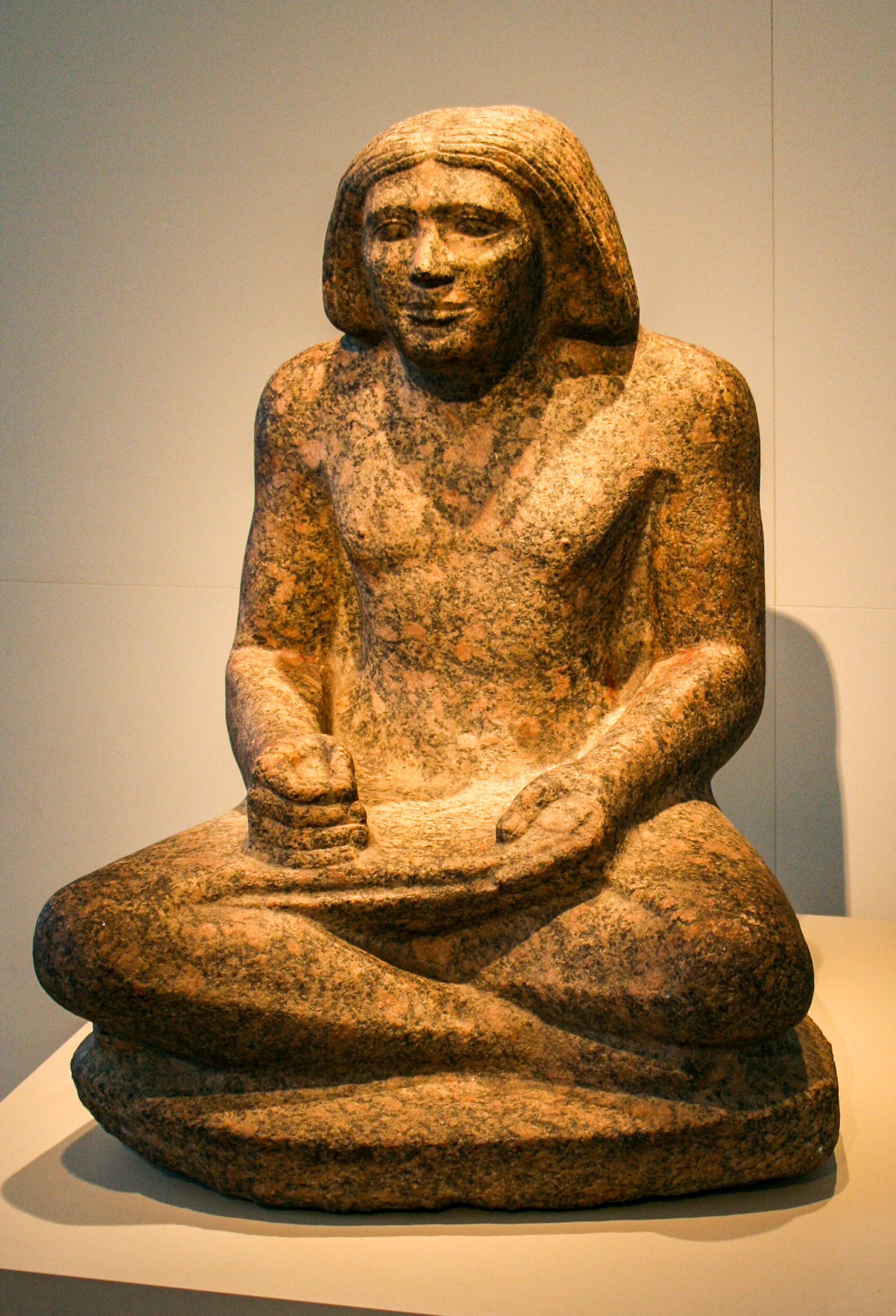 Scribe figure of Dersenedj - Altes Reich, 5. Dinastie, um 2400 v. Chr. - Rosengranit